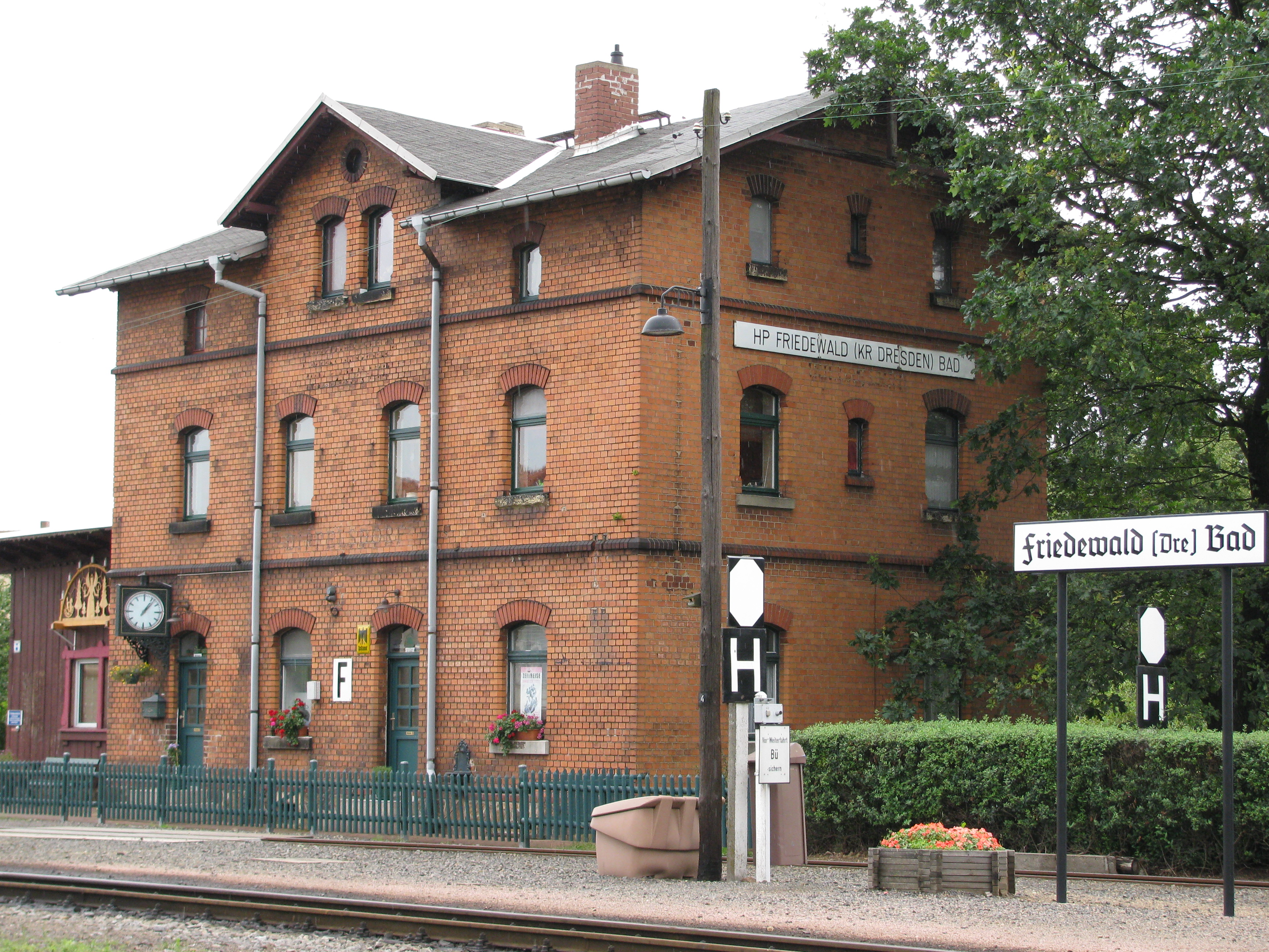 Haltepunkt Friedewald Bad der Lößnitzgrundbahn, in Dippelsdorf im Ortsteil Friedewald, Gemeinde Moritzburg, Sachsen. Schwach lesbar ist am Gebäude (zwischen EG und 1. Stock über der Eingangstür) noch der bis 1940 gültige Bahnhofsname Dippelsdorf.